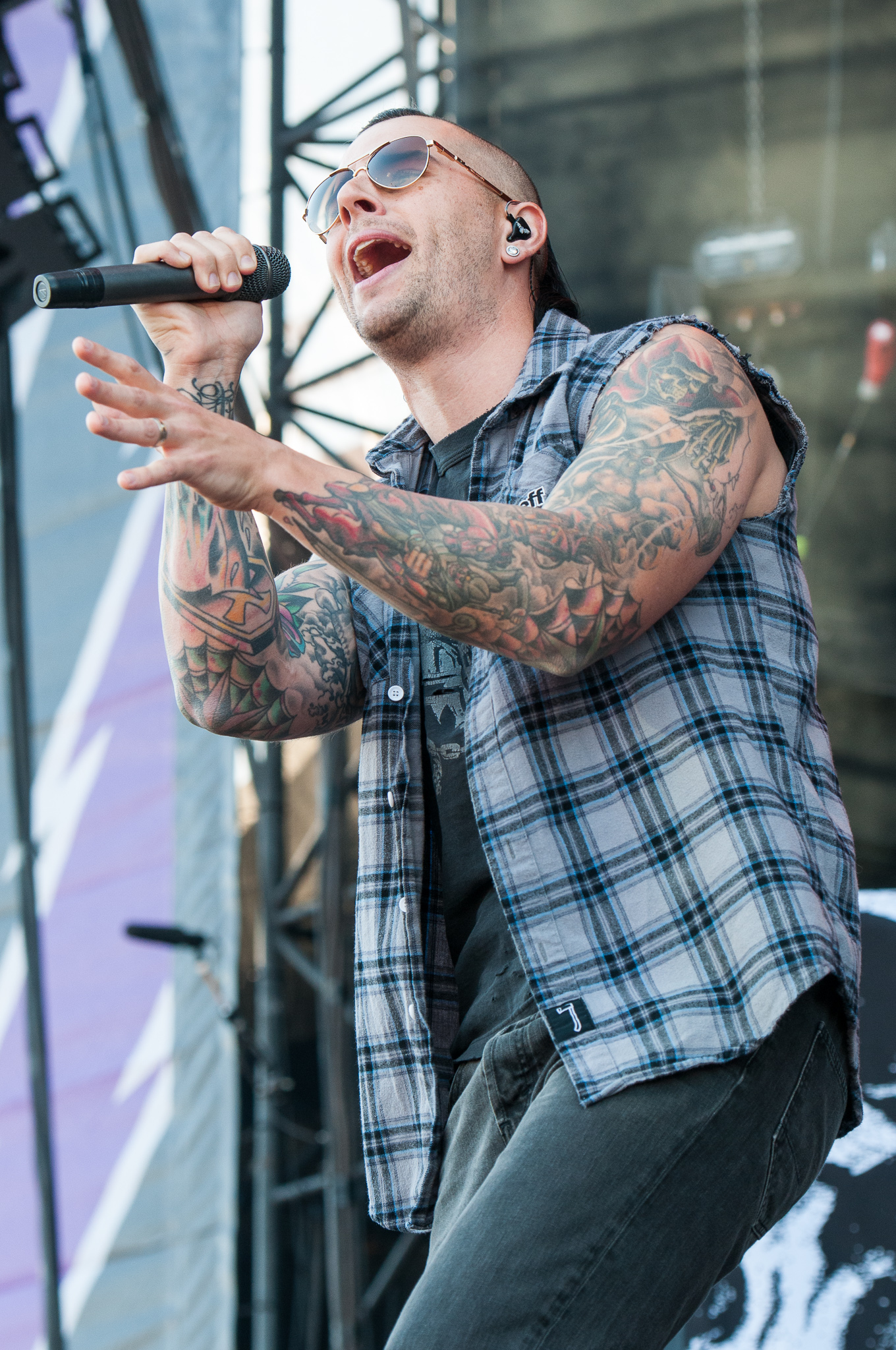 ARGO-Konzerte,Avenged Sevenfold,Konzert,Livekonzert,Livemusik,M. Shadows,Matthew Charles Sanders,Musik,RiP,Rock im Park 2014